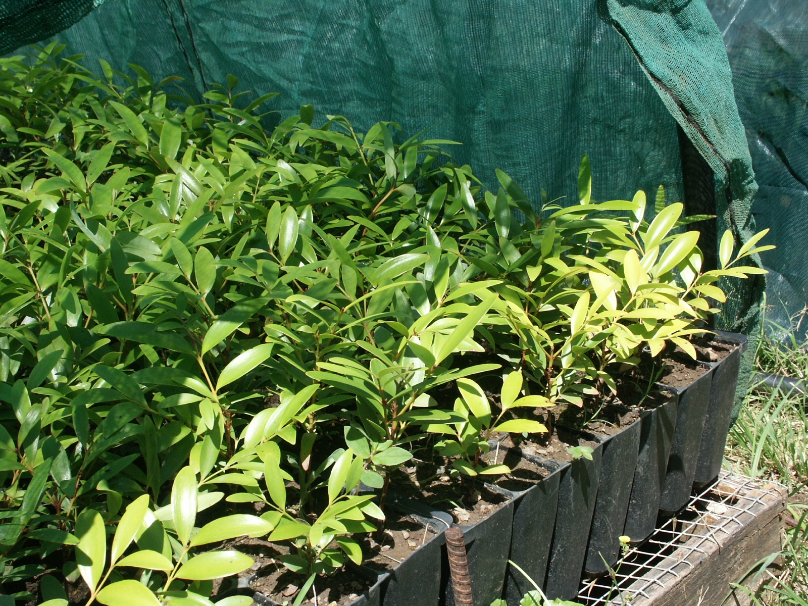 Pépinière Mara-Jati de Thio : plants d'Agathis lanceolata. Nouvelle-Calédonie.